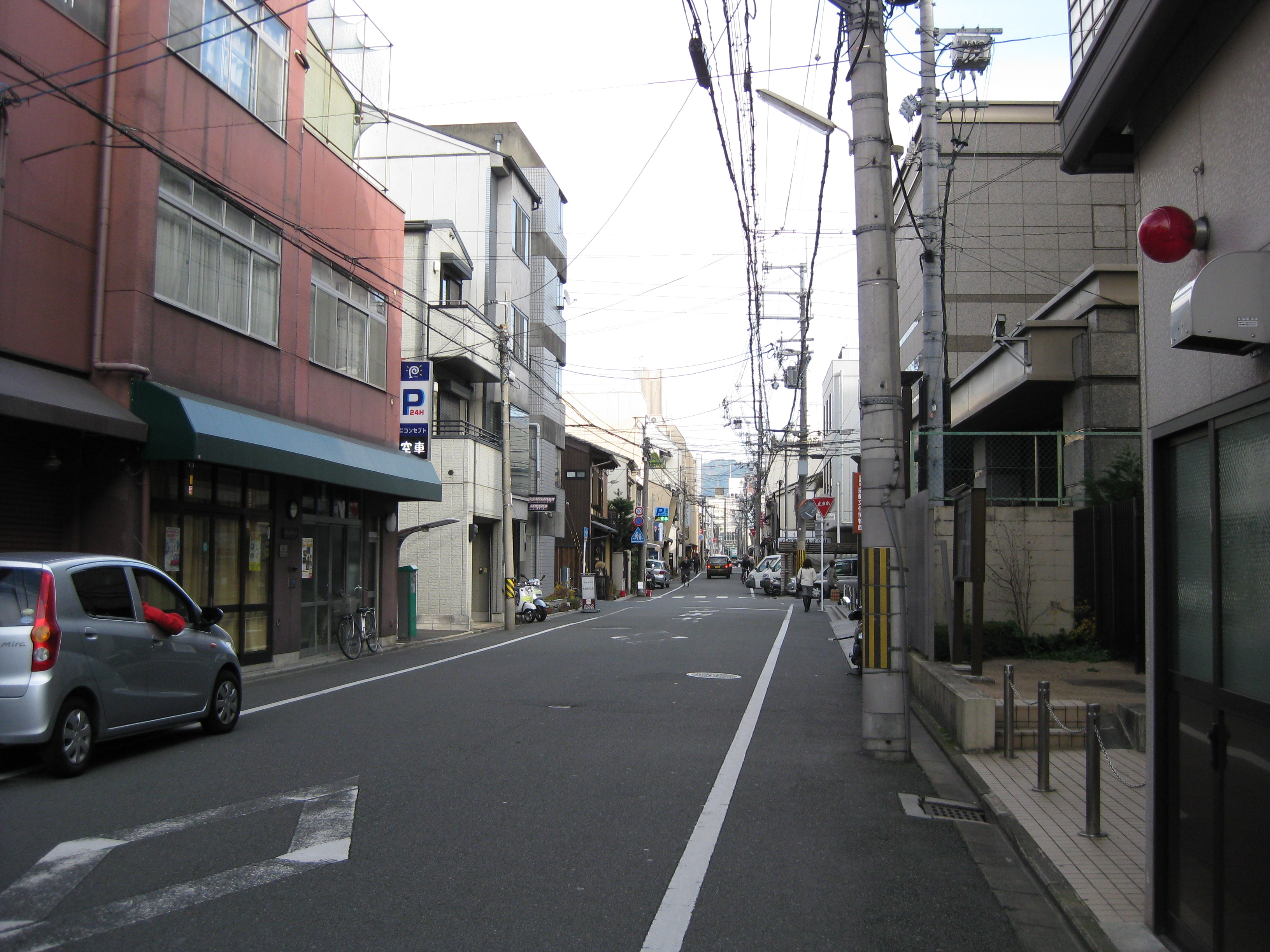 姉小路通。間之町通との交差点付近から東方向